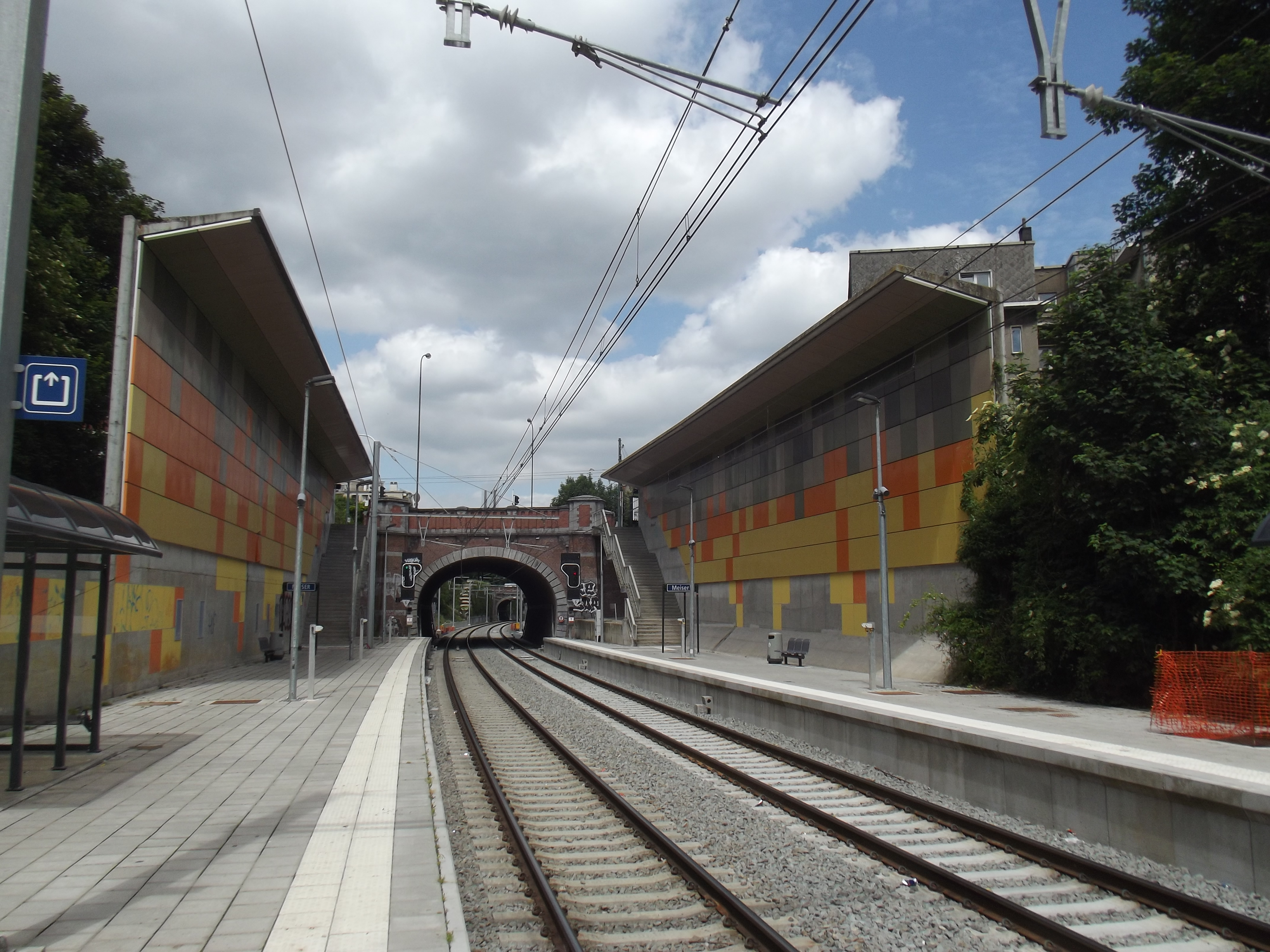 Station Meiser